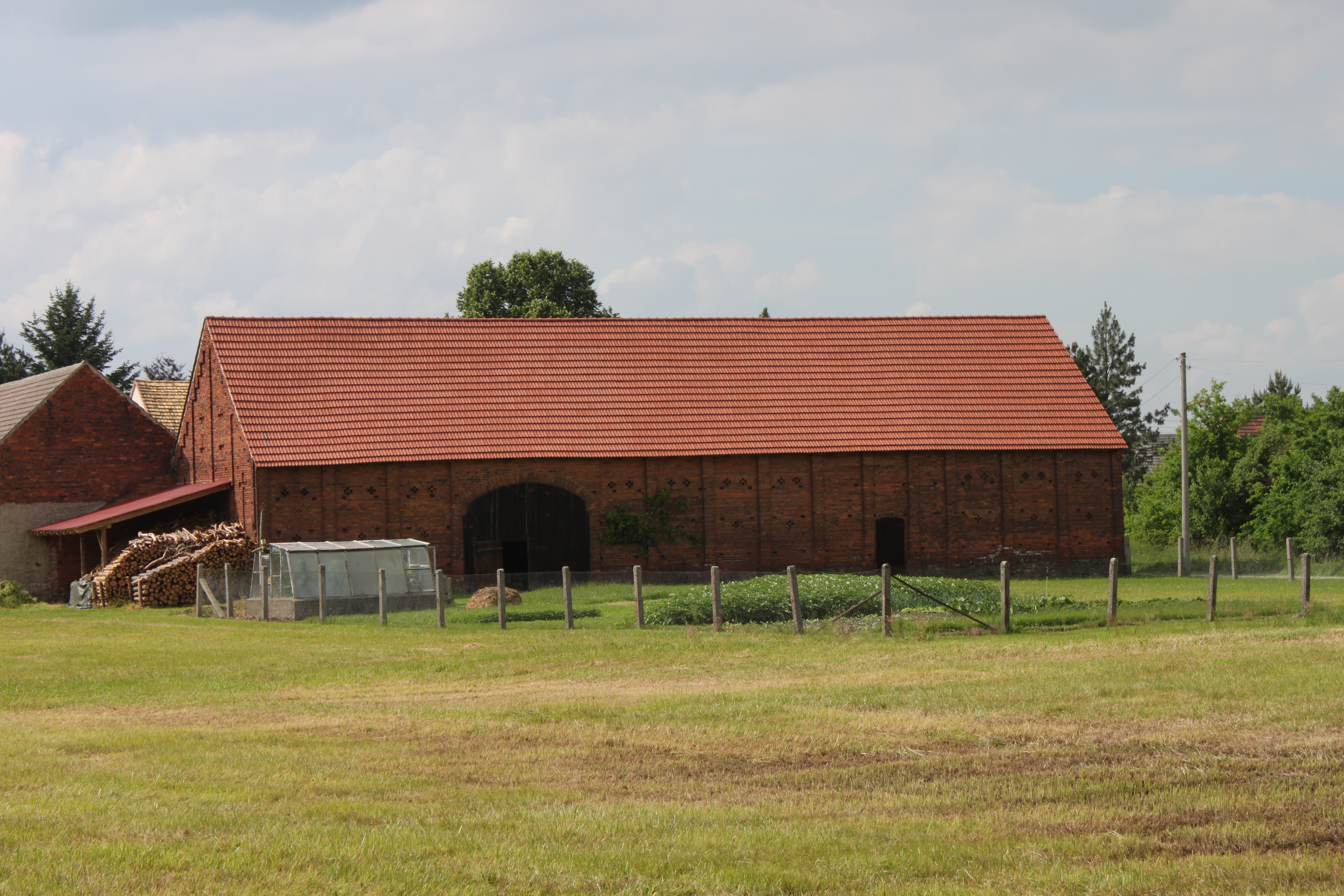 Dorfstraße 23; Durchfahrtsscheune eines Großbauerngehöfts